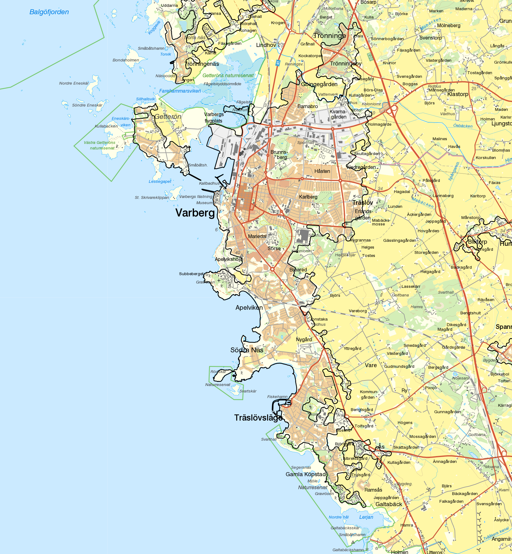 Tätorterna Varberg och Getterön med gränserna från Statistiska centralbyråns tätortsavgränsning 2015 i svart. Bakgrundskarta från Lantmäteriet, skala 1:30 236.